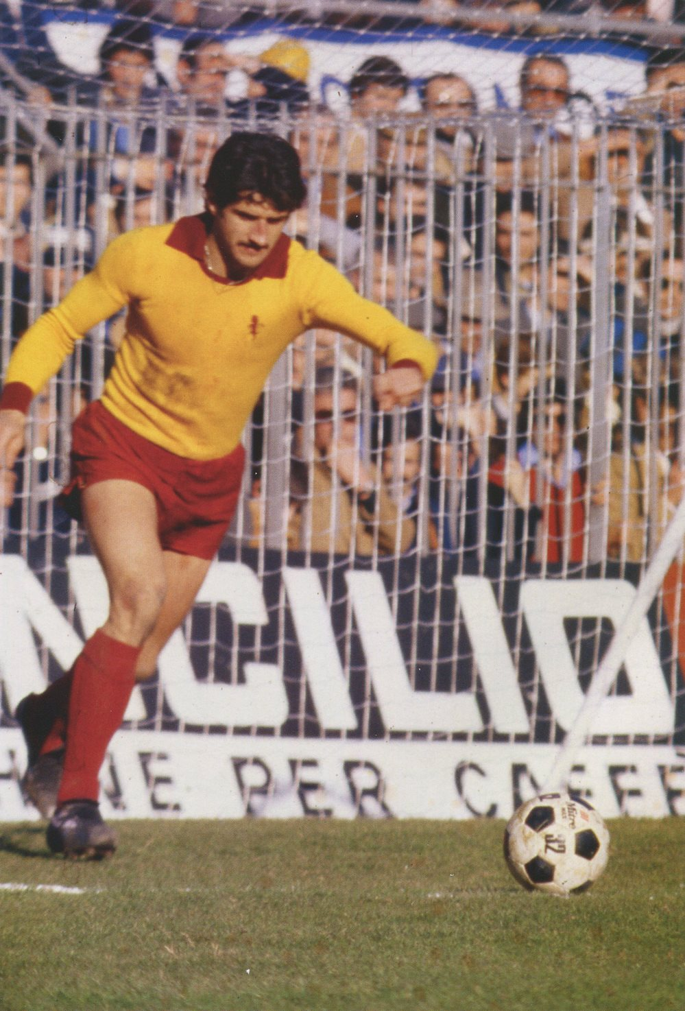 Il portiere di calcio italiano Giuliano Terraneo]in azione al tra gli anni 70 e 80 del XX secolo.